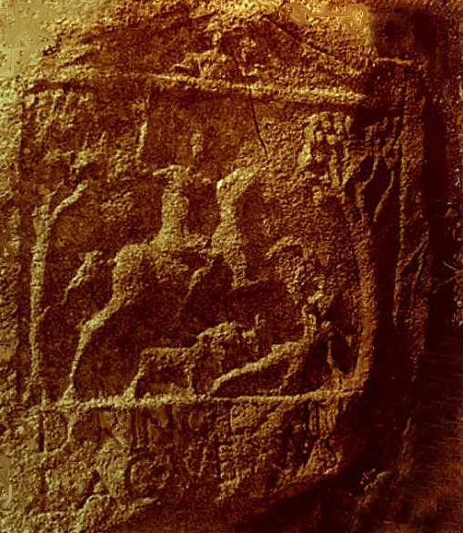 Аҧсшәа: Барелеф с тракийски конник и надпис на латински от Филипи, посветен на "господаря Ринкалеус"